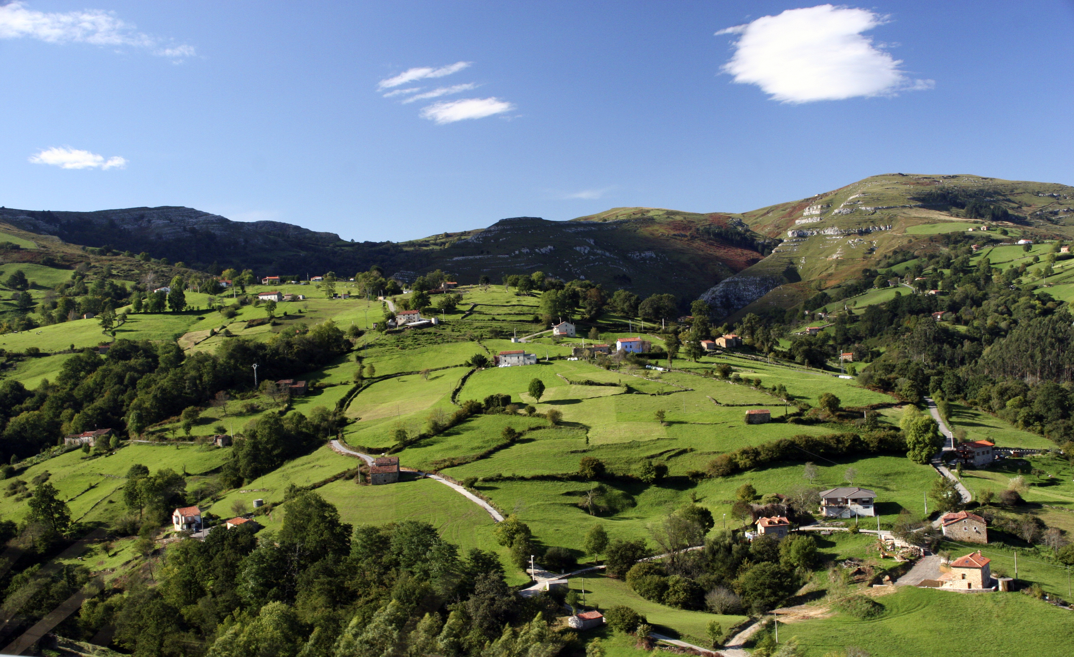 Paisaje de prados de siega en Cantabria (España). Monte (Riotuerto), Barrio de Idiopuerta.